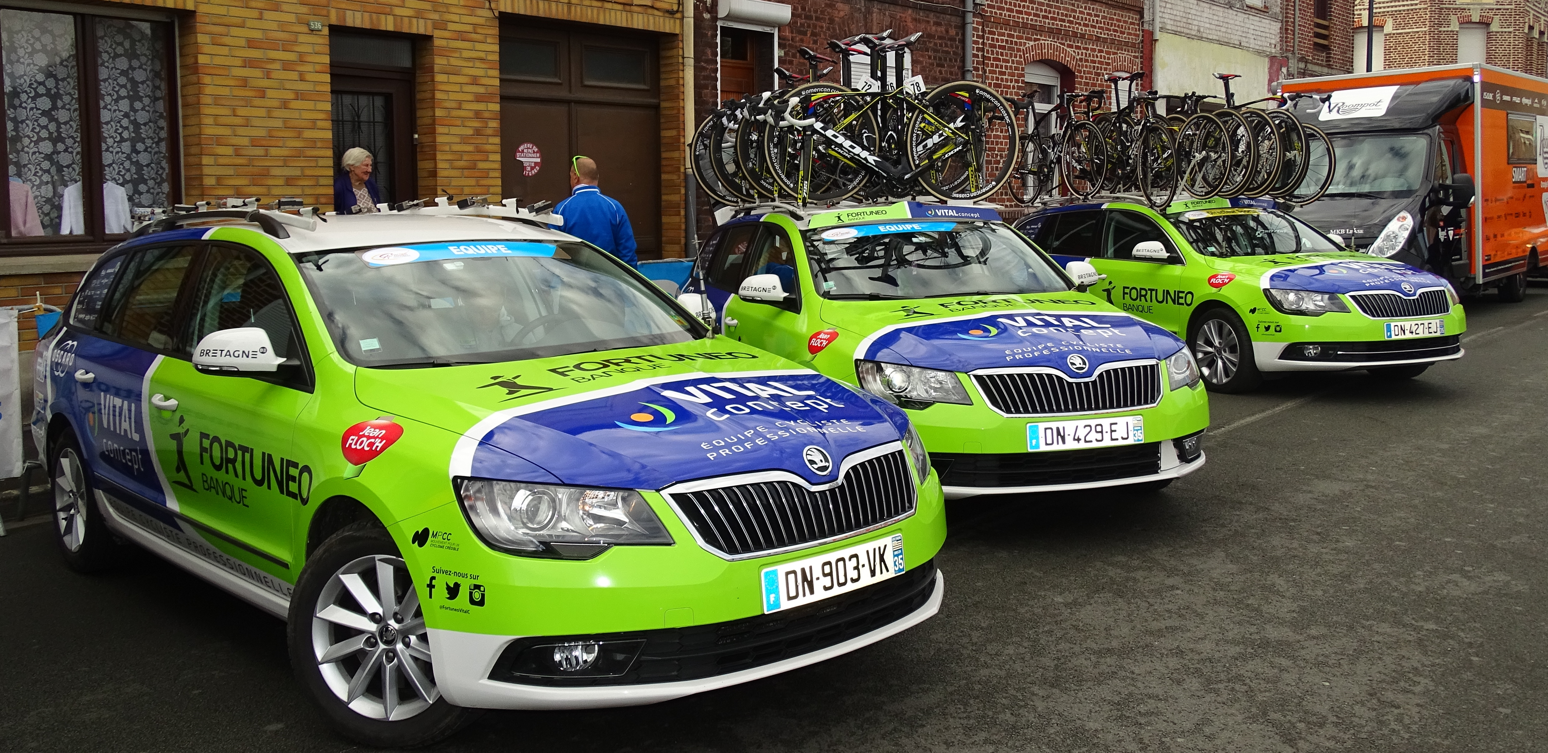 Reportage réalisé le jeudi 14 avril à l'occasion du départ et de l'arrivée du Grand Prix de Denain 2016 à Denain, Nord, Nord-Pas-de-Calais-Picardie, France.